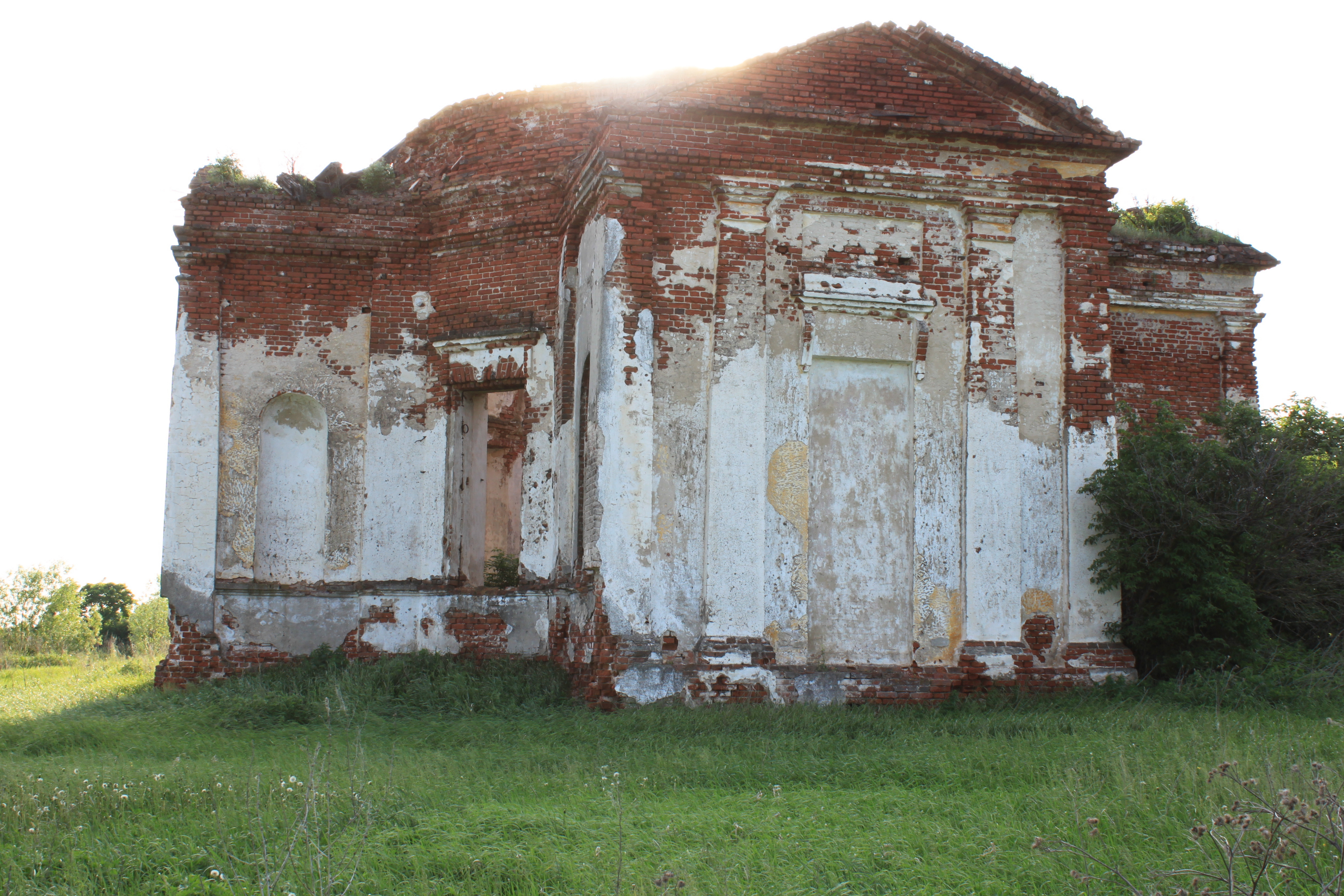 Церковь Бестужево Арзамасский район